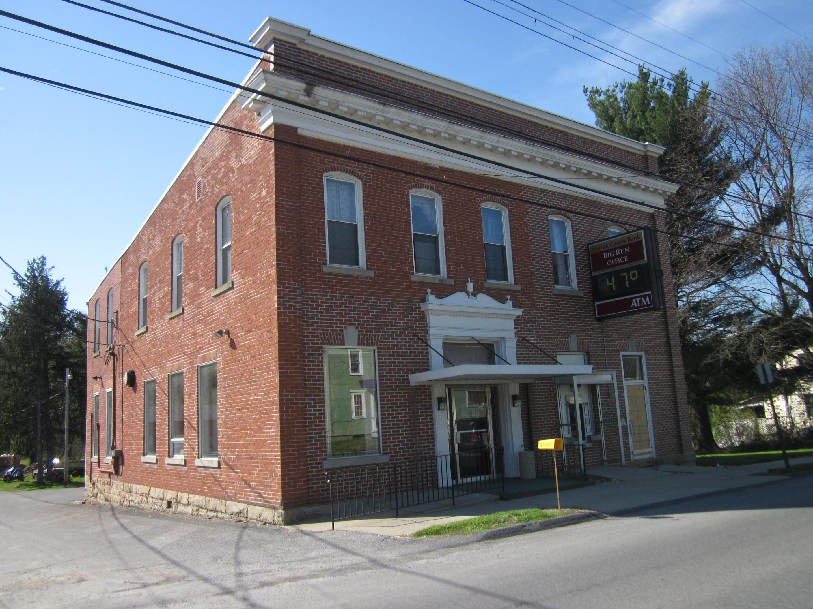 Big Run, Pennsylvania